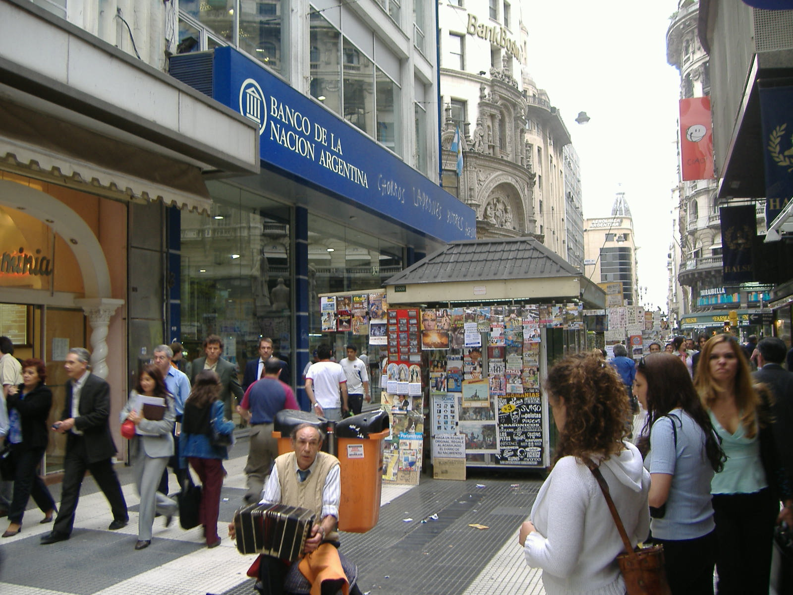 Un artista callejero en la calle Florida, Buenos Aires